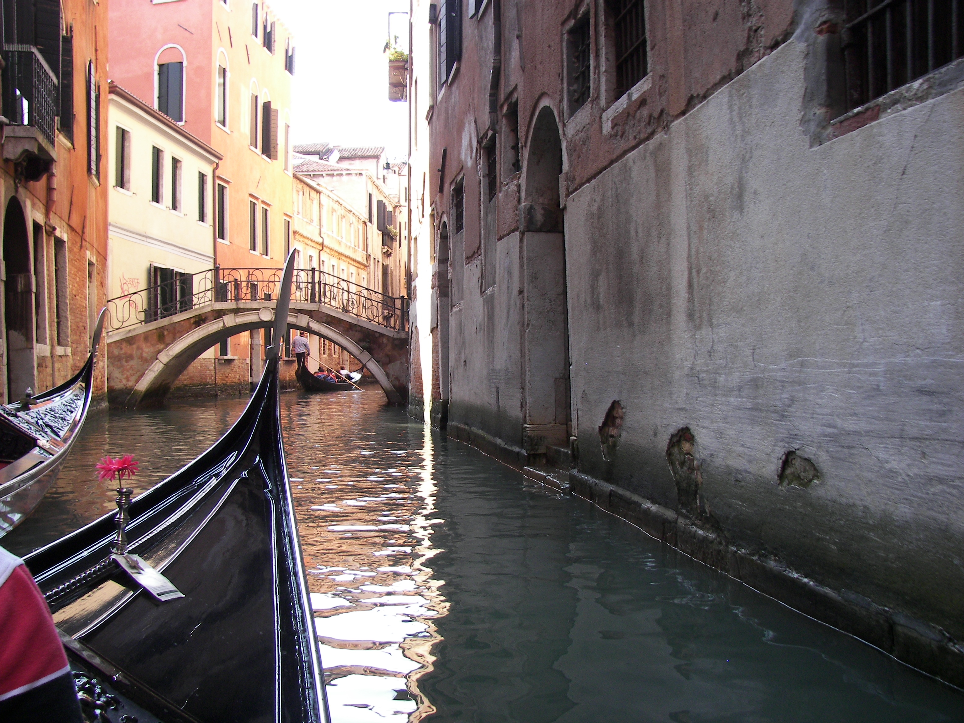 Ponte de la Balote on Rio San Salvador in Venezia.